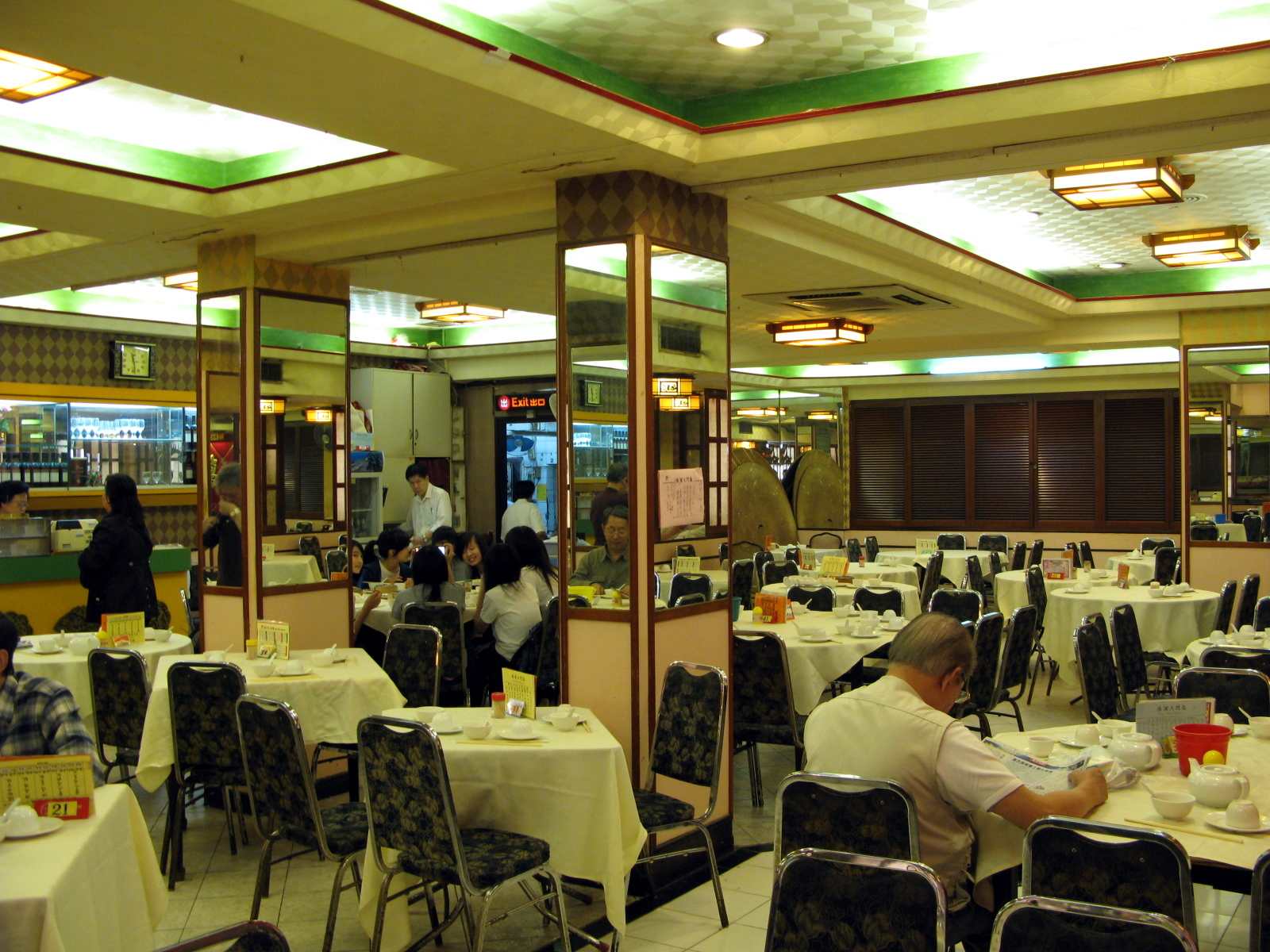 Lung Moon Restaurant 龍門大酒樓